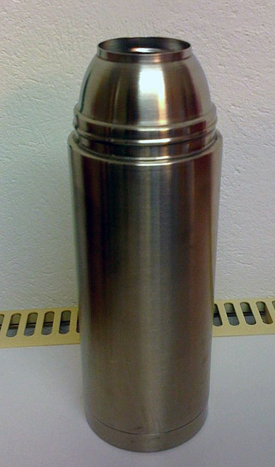 Thermoskanne ohne Deckel